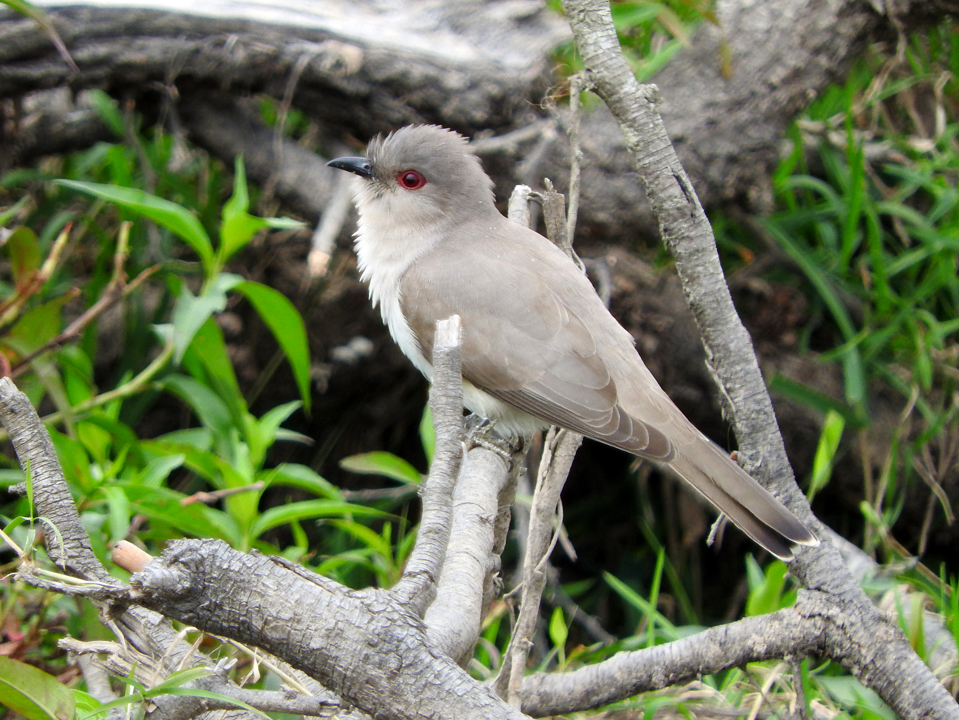 Coccycua cinerea en Camba Trapo, Corrientes, Argentina